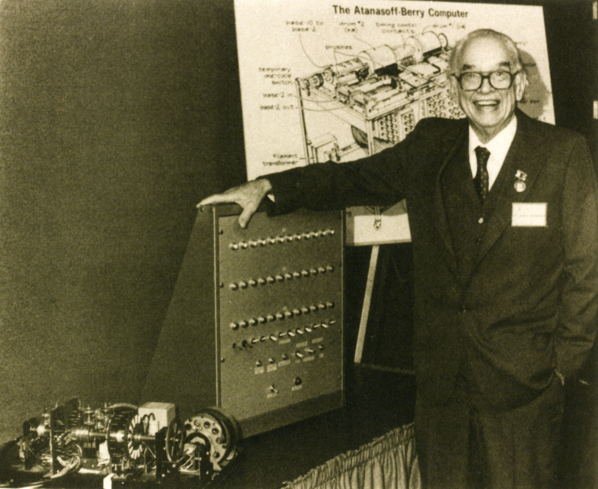 ATANASOFF_Pic#10